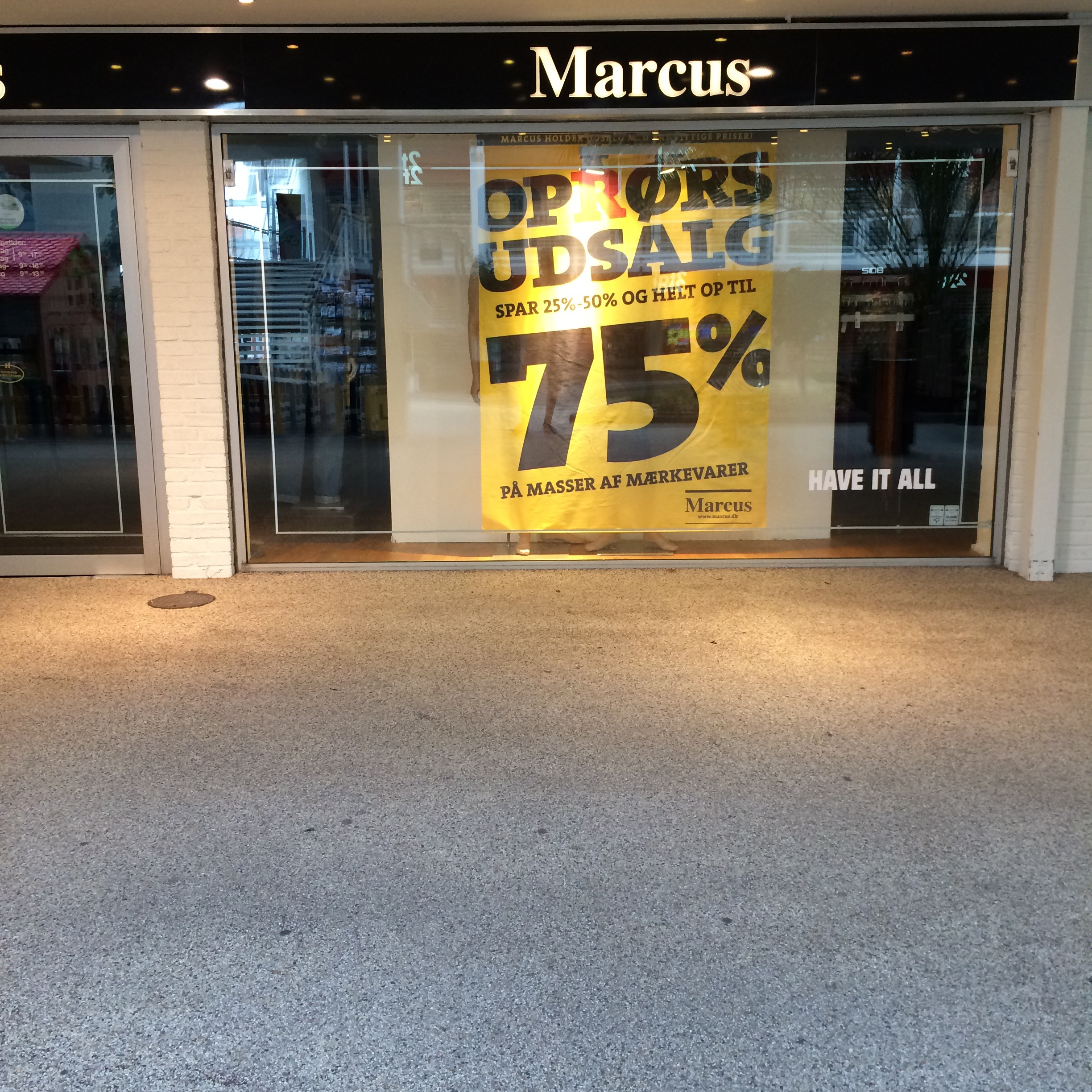 Marcus - Butikscenter Hadsund